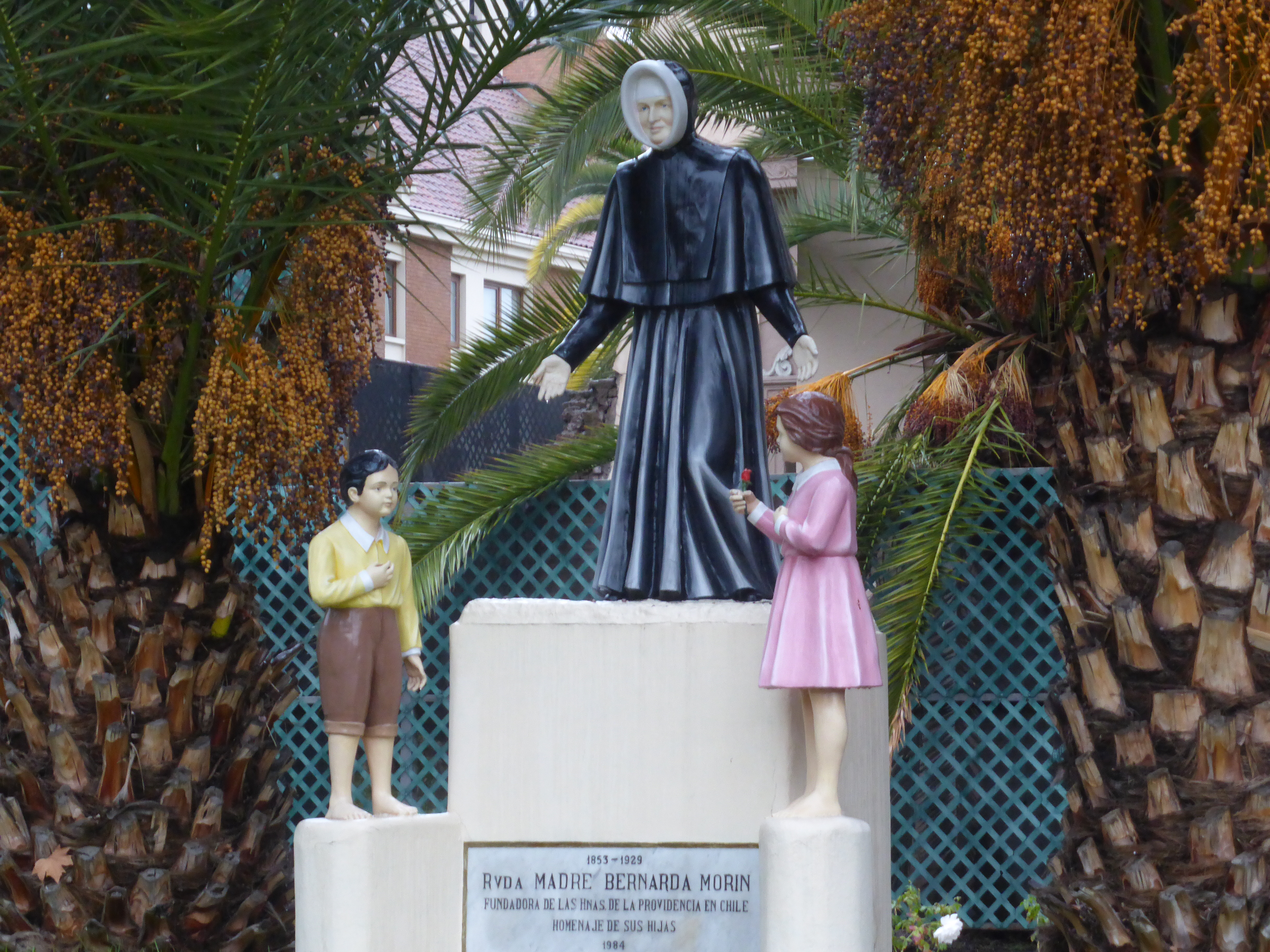 Grupo escultórico en recuerdo de Bernarda Morin, fundadora de las "Hermanas de la Providencia" en Chile. Se encuentra en los jardines de la "Iglesia Matriz de las Hermanas de la Providencia", en la comuna de Providencia, Santiago de Chile. La lápida es del año 1984.